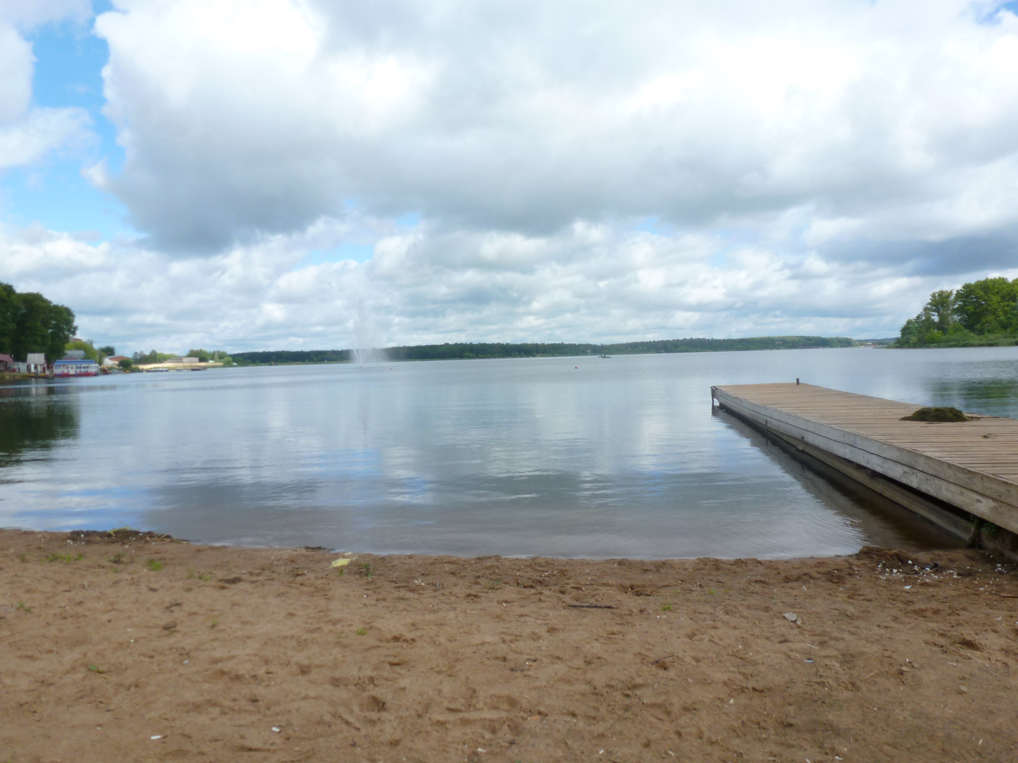 Lago Senejx, junio de 2012. Vido de sur la plagxo (Solnecxnogorsk).